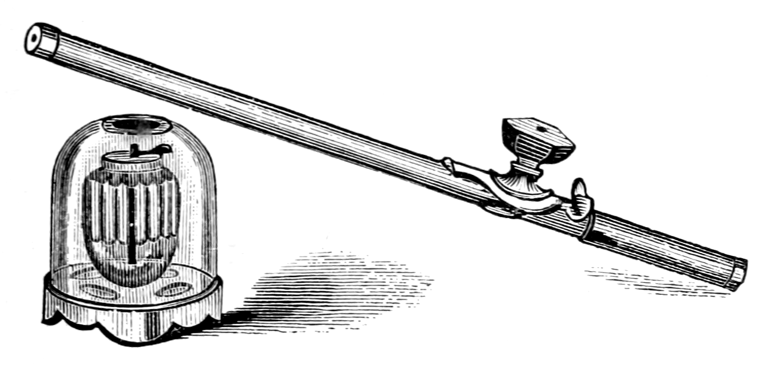 "Opium Pipe"